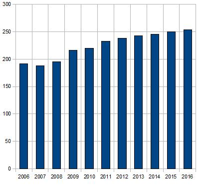 IMFによる日本の債務のGDPに対する比率